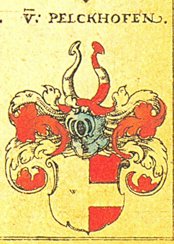 Wappen Pelkoven aus: Johann Siebmacher: New Wappenbuch eingescannt aus: Horst Appuhn (Hrsg.), Johann Siebmachers Wappenbuch. Die bibliophilen Taschenbücher 538, 2. verb. Aufl , Dortmund 1989 Bayerische Blatt 84